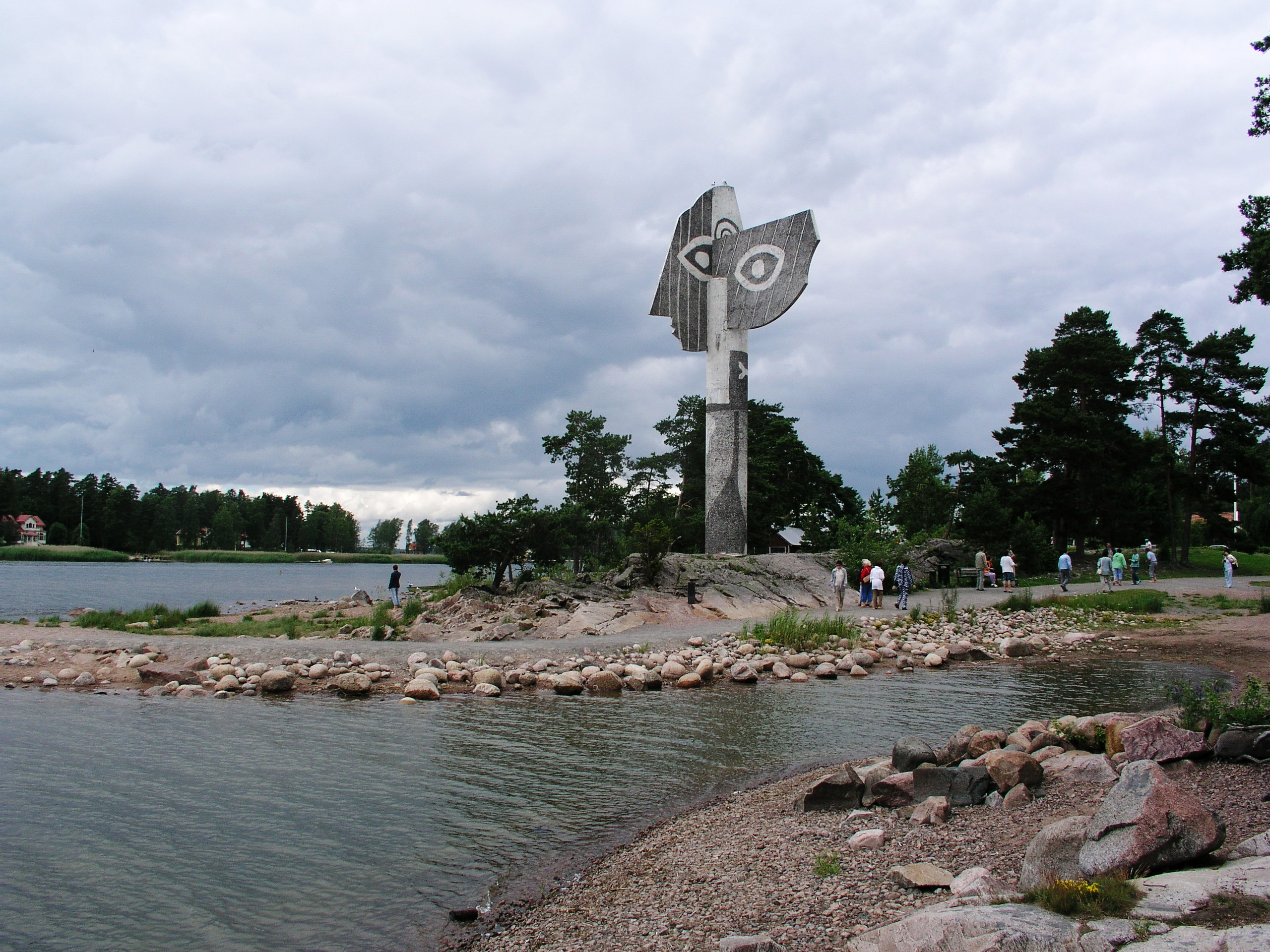 Picasso statue in Kristinehamn, Sweden.